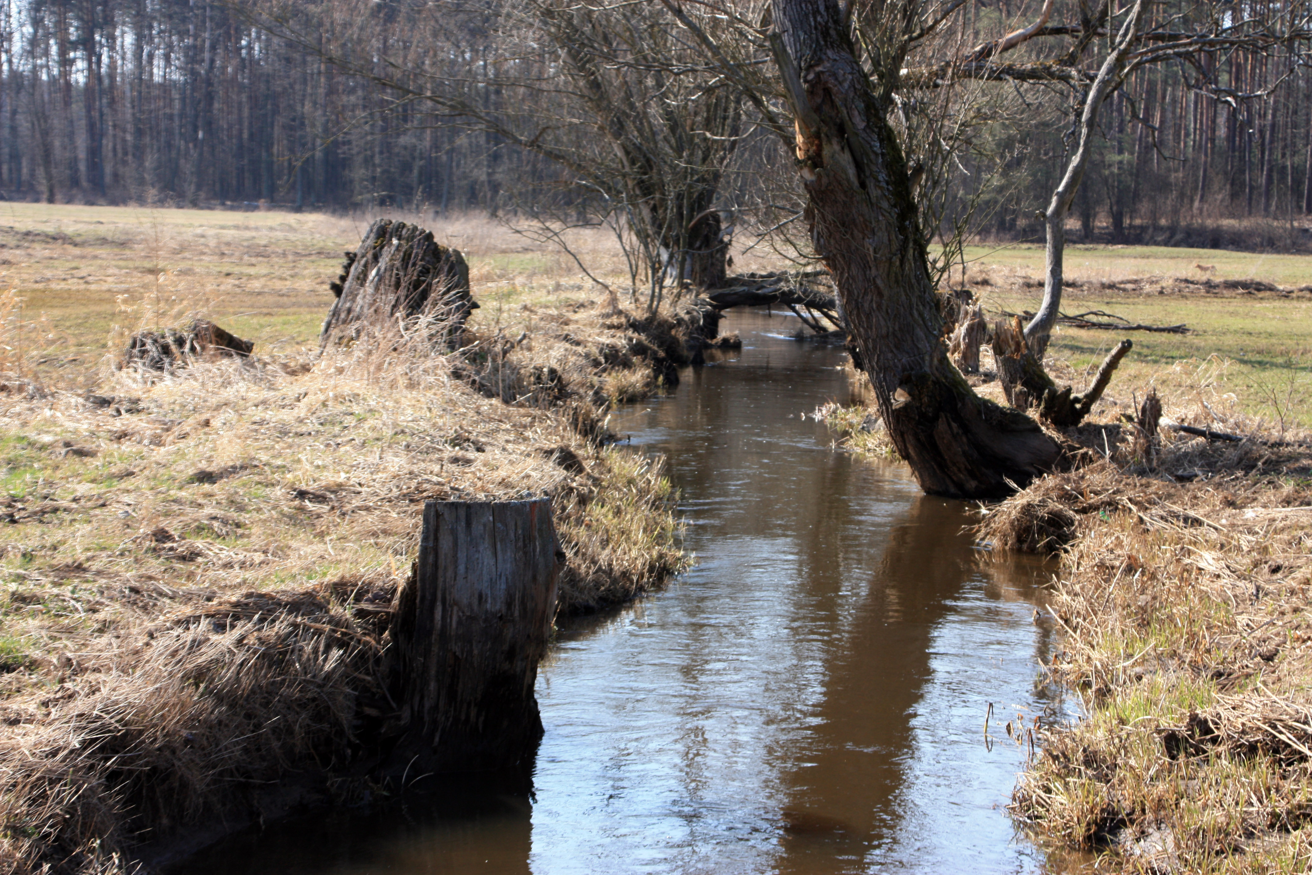 Rzeka Prut (dopływ Narwi) w okolicach Kępy Zatorskiej